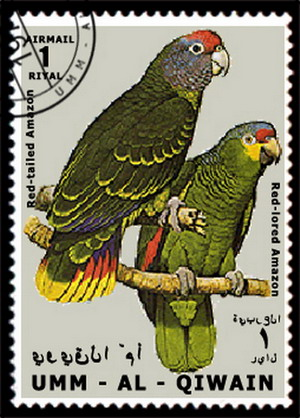 Почтовая марка эмирата Умм-эль-Кайвайн (ОАЭ)